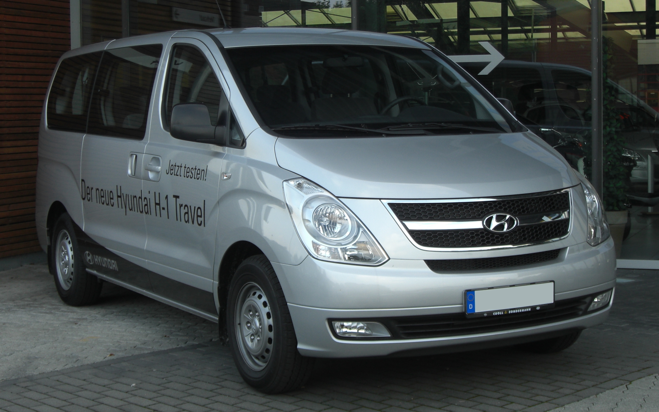 Hyundai H1 Travel